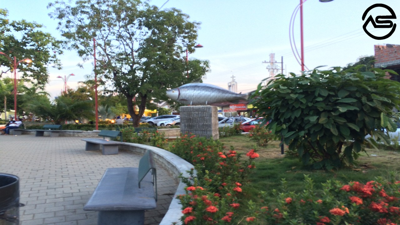 Bocachico lateral